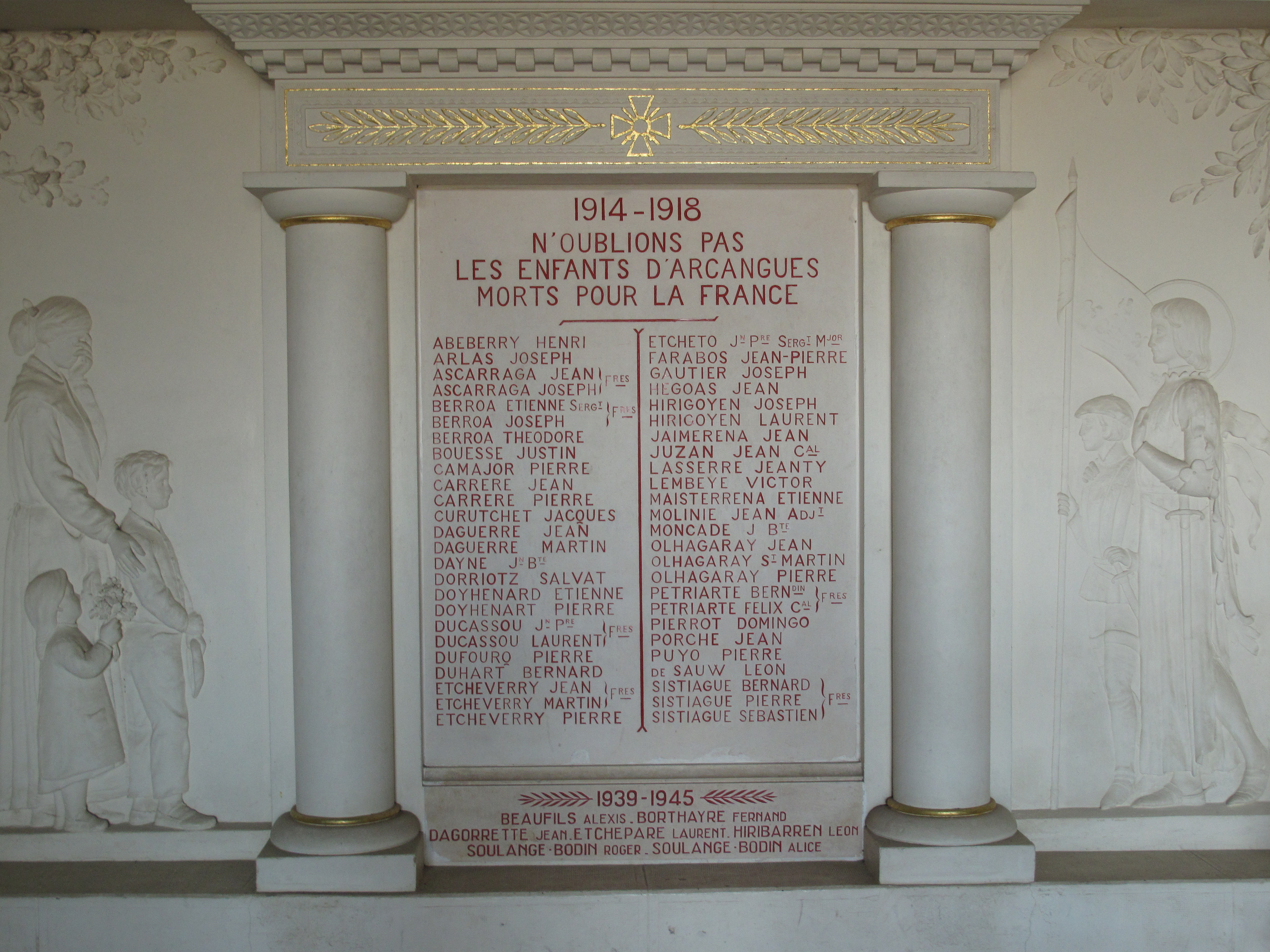 Iglesia de Arcangues, en Labort, Aquitania(Francia)